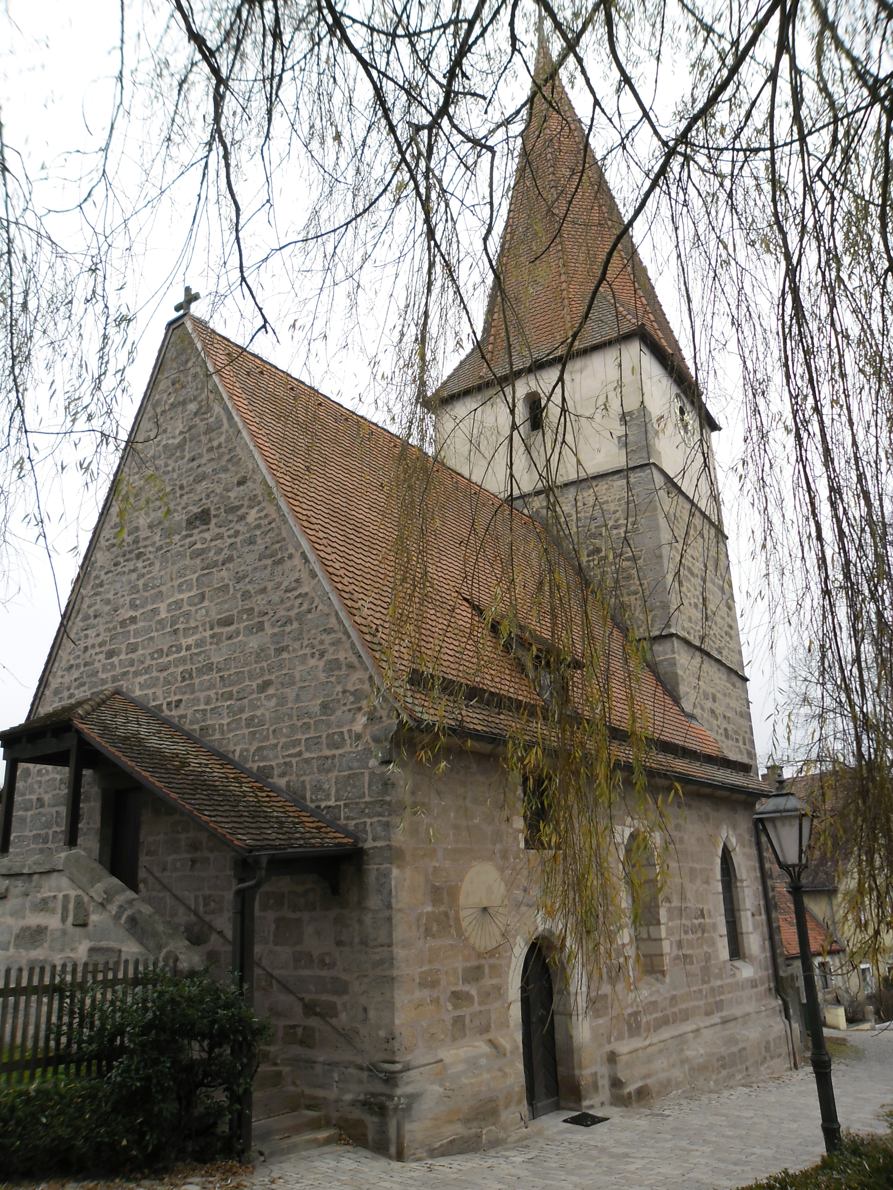 Ansicht des am linken Zennufer gelegenen Langenzenner Stadtteiles Laubendorf